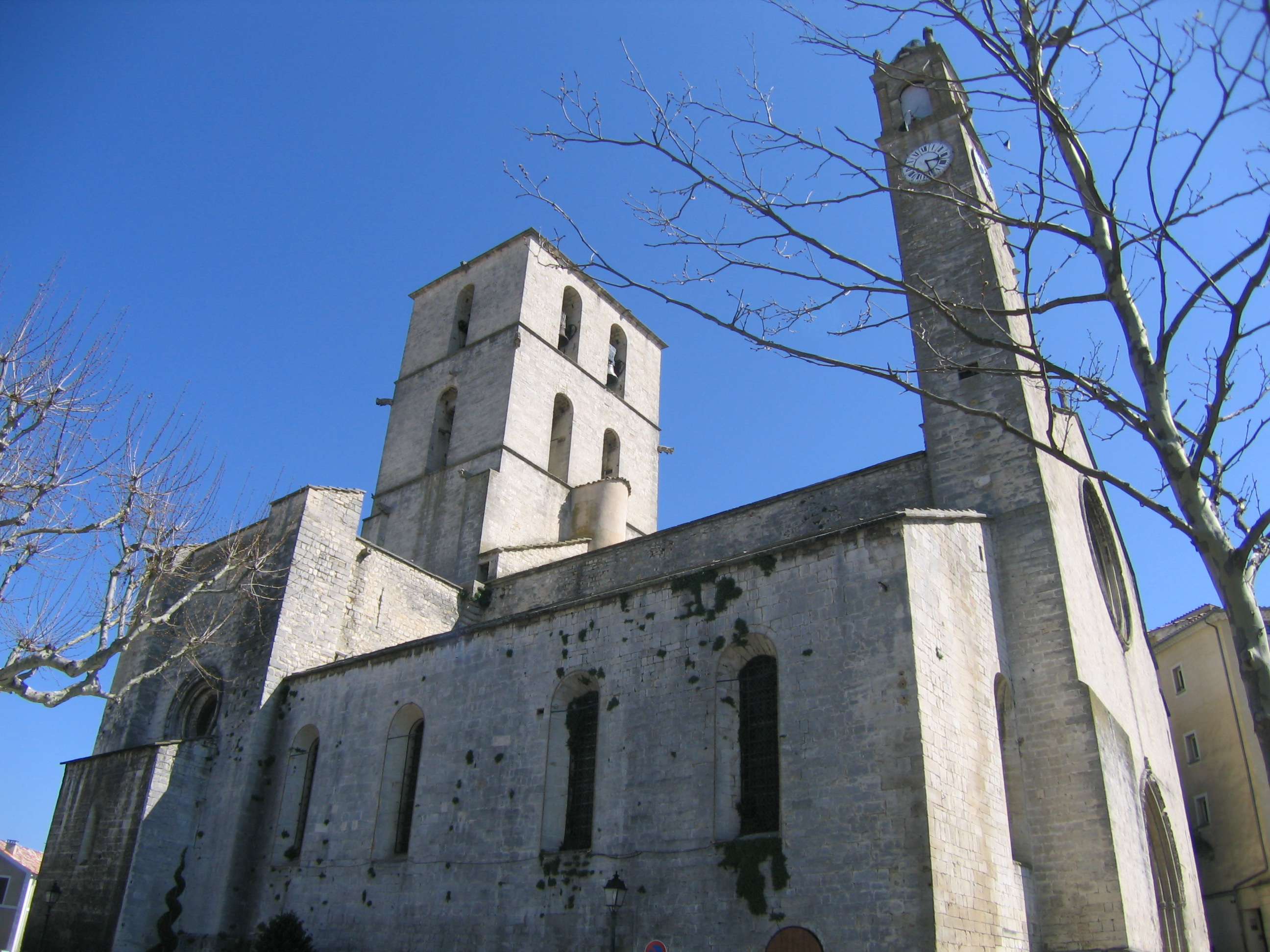 Cathédrale Notre-Dame du Bourguet (Forcalquier)